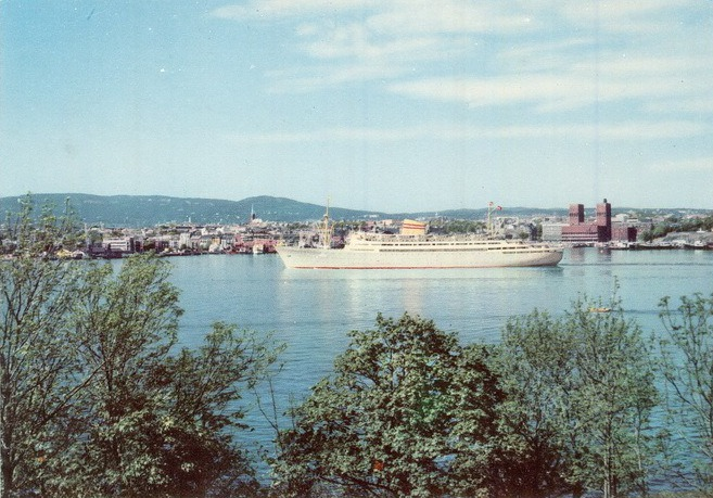 Postkort med Amerikalinjens MS Bergensfjord (1956-1971) på vei ut fra Vippetangen i Oslo.